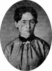 Russian writer Valentina Dmitryeva